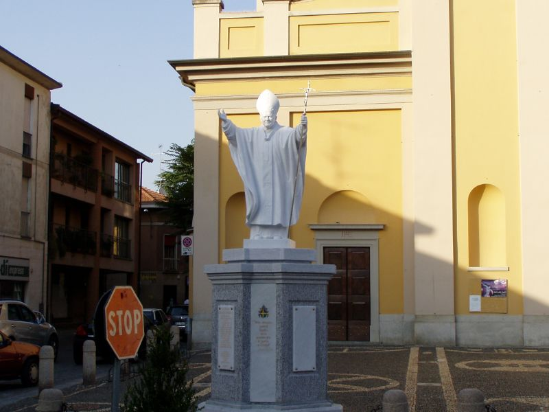 Statua di Giovanni Paolo II antistante la Chiesa di San Giulio